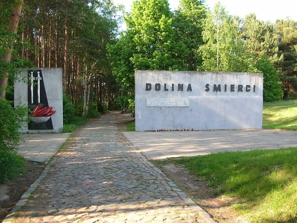 Tablica u wrót Doliny Śmierci w Bydgoszczy